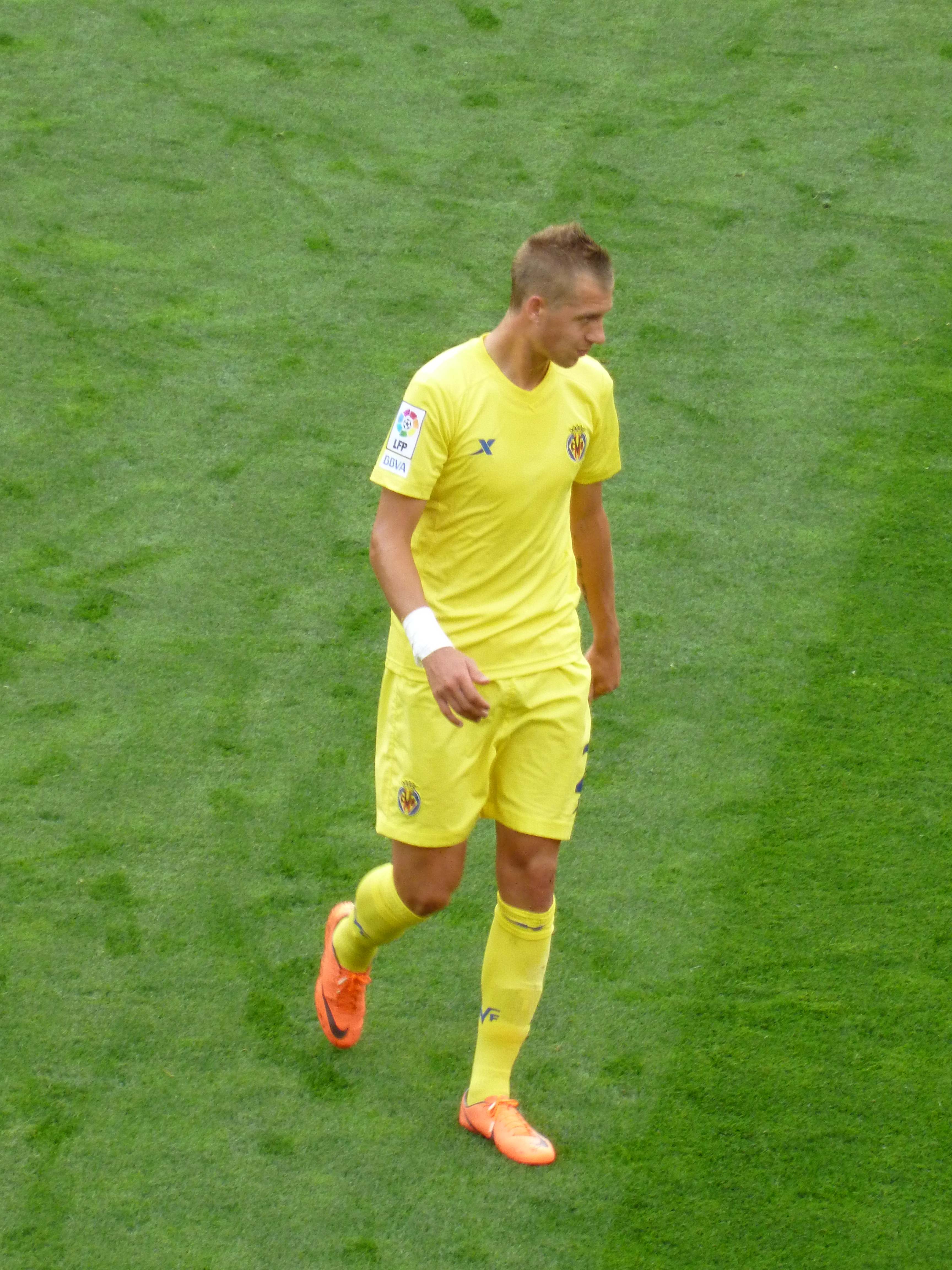 Florian Lejeune en el partir Vila-real CF "B" en front del Deportivo de La Corunya a l'última jornada de la Segona Divisió Espanyola 2011-12 a l'estadi de El Madrigal.